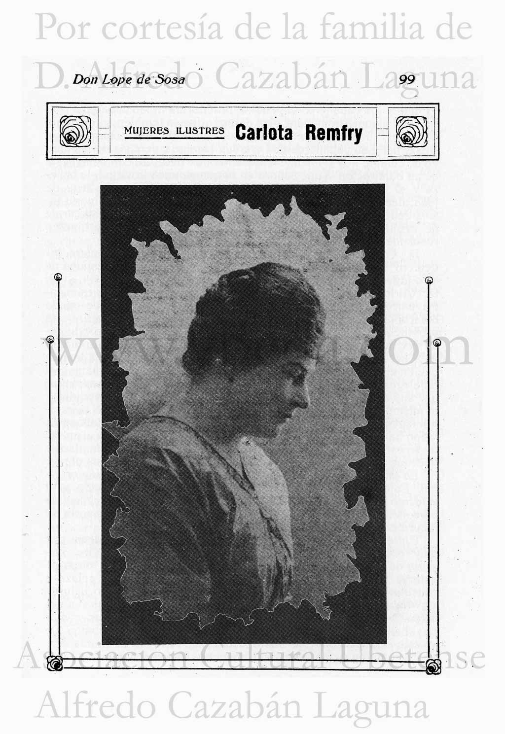 Pág. 99 del n.º 76 (abril de 1919) de la revista Don Lope de Sosa.